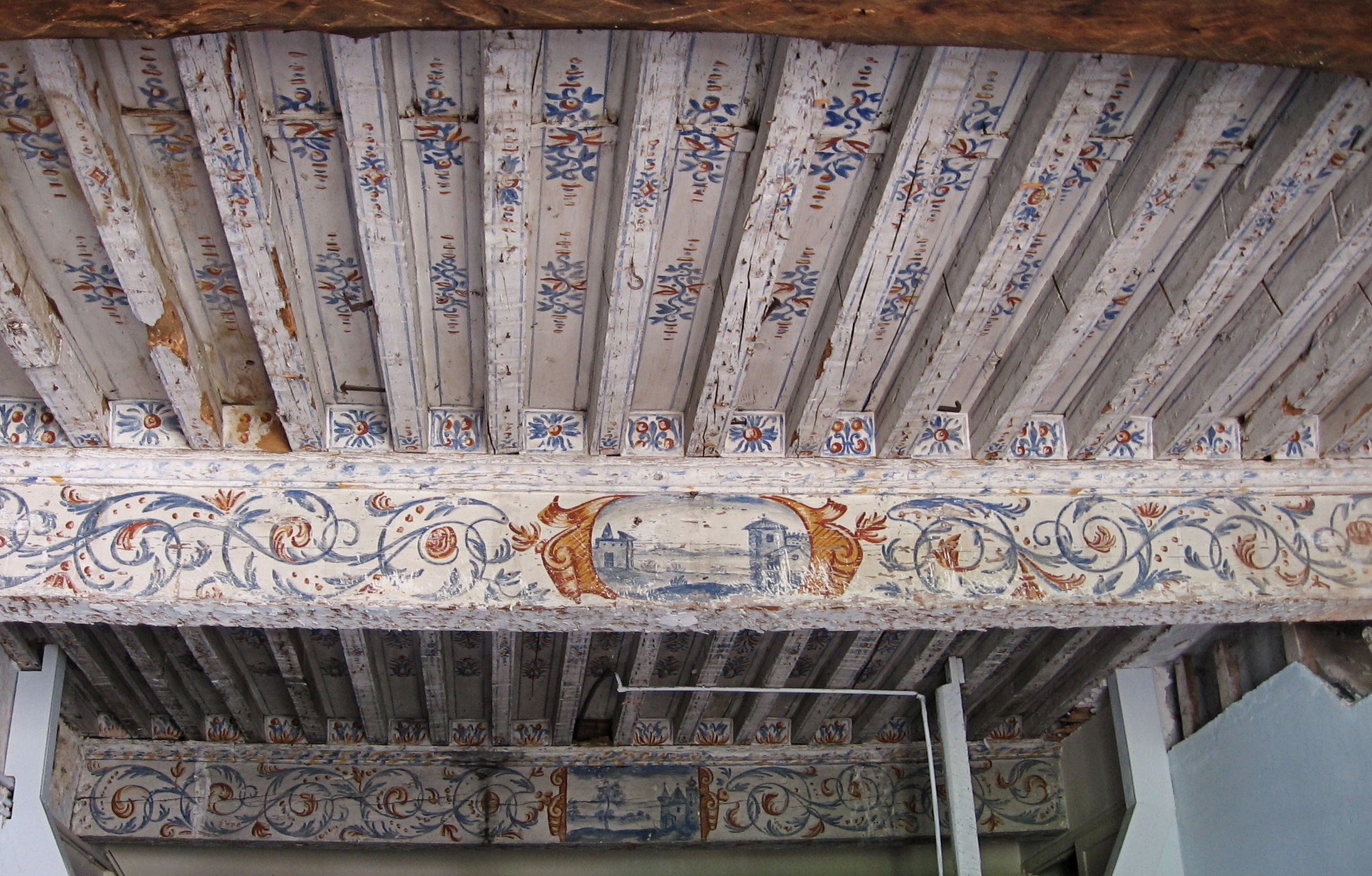 Plafond peint (XVIIIe) du second Salon du Château de Fiches